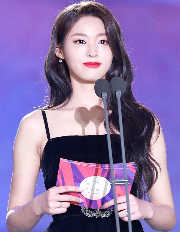 180503 AOA 설현 백상예술대상